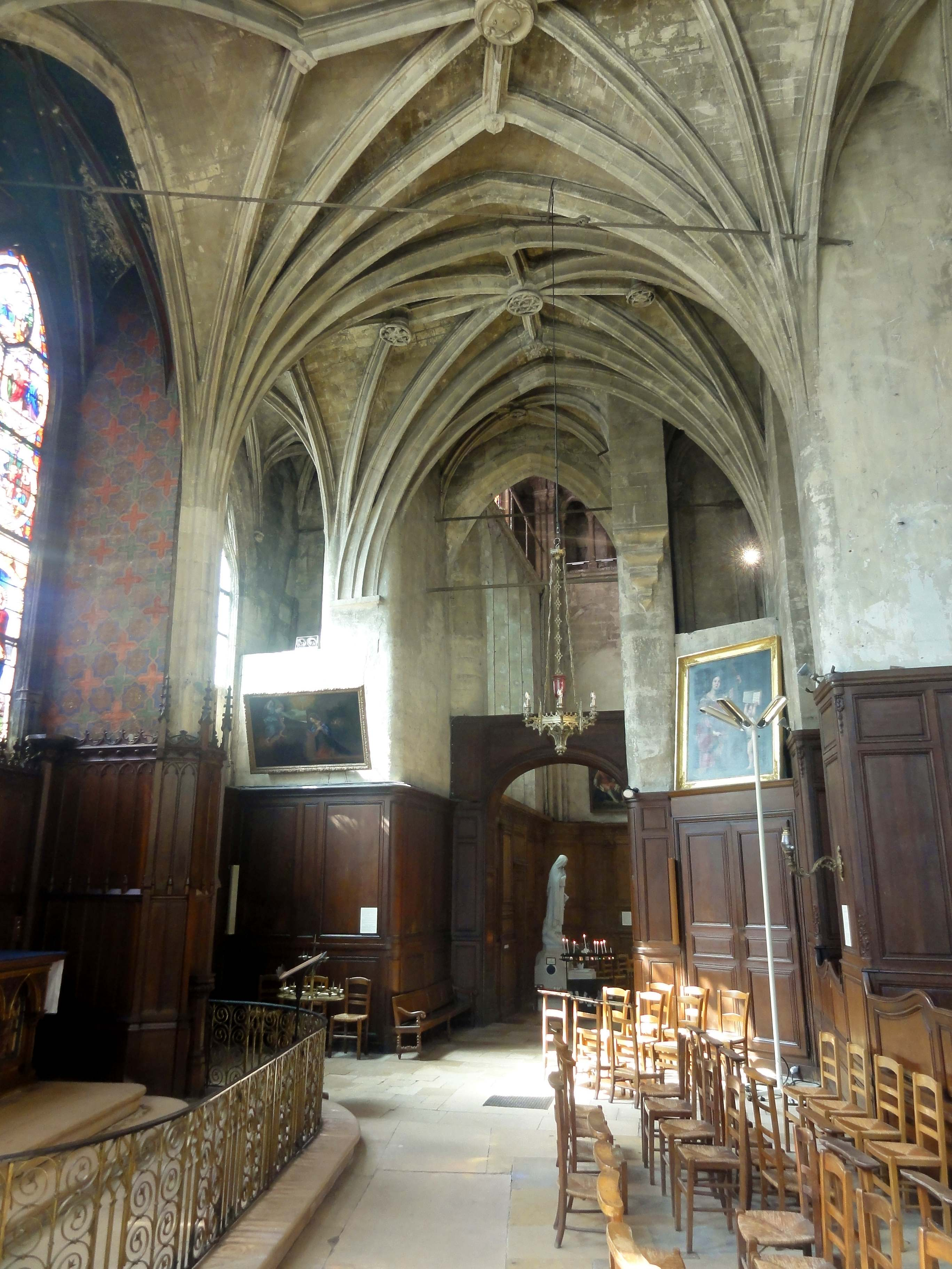 Déambulatoire - voir le titre du fichier.